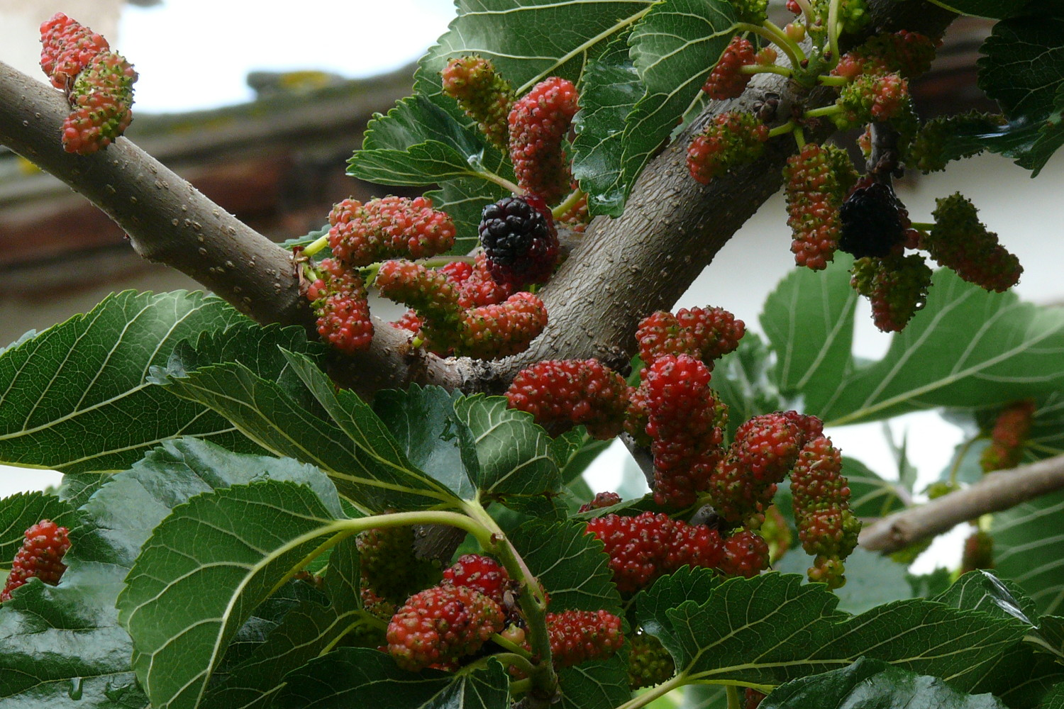 Morus nigra, fruit